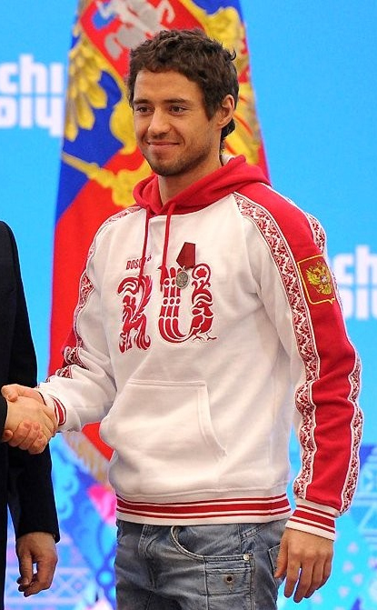 Медалью ордена «За заслуги перед Отечеством» второй степени награждён бронзовый призёр Олимпийских игр в лыжных гонках Илья Черноусов.